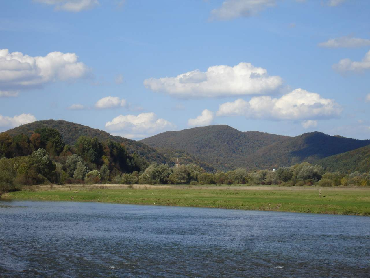 Międzybrodzie at the San river near Sanok